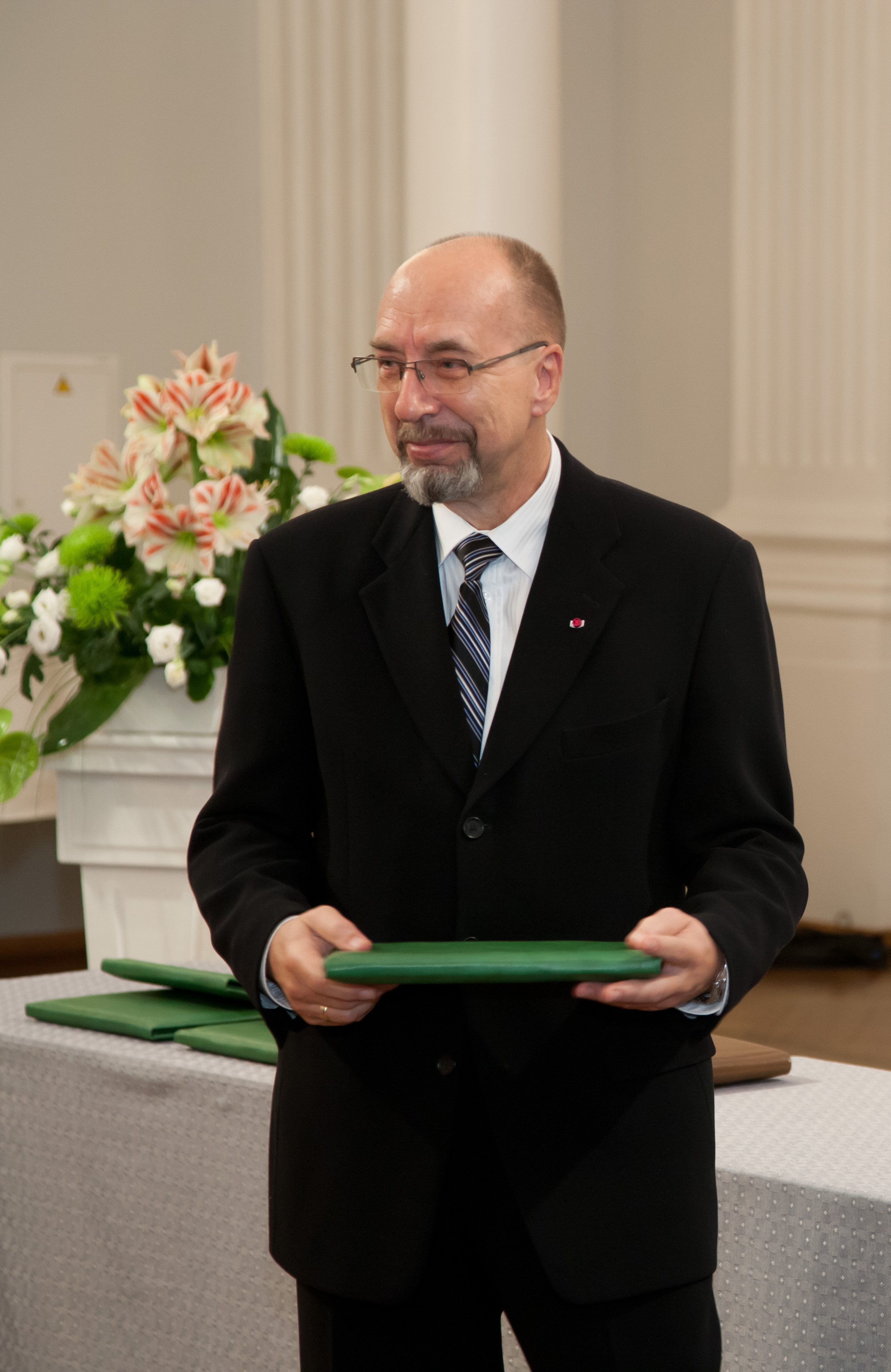 Maailma kultuurinõukogu audiplomi pälvinud professor Peeter Saari TÜ aulas 10. novembril 2011, kus toimus Maailma Kultuurinõukogu (World Cultural Council; WCC) auhinnatseremoonia.